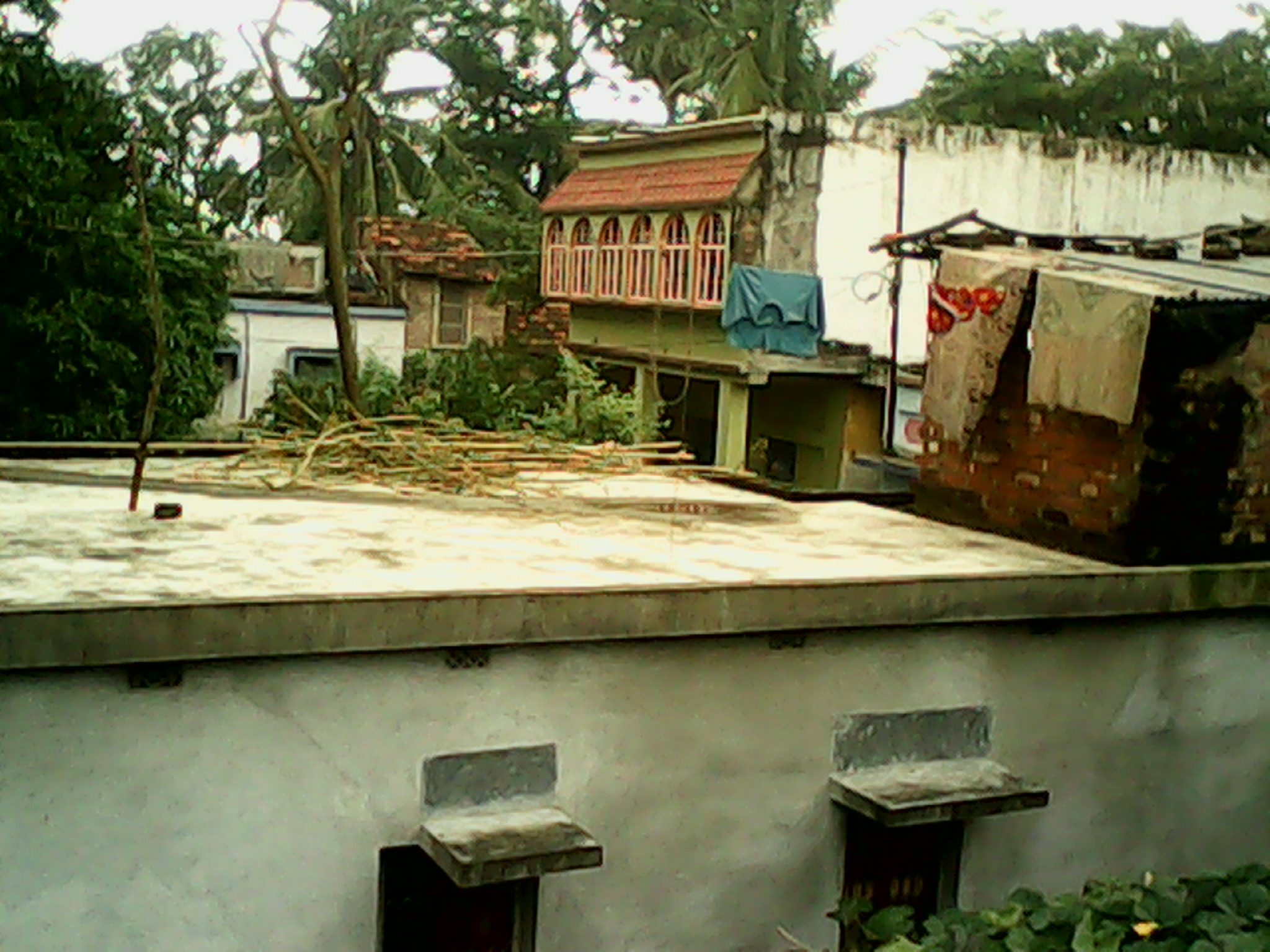 Jhuruli Mazer Para Skyline